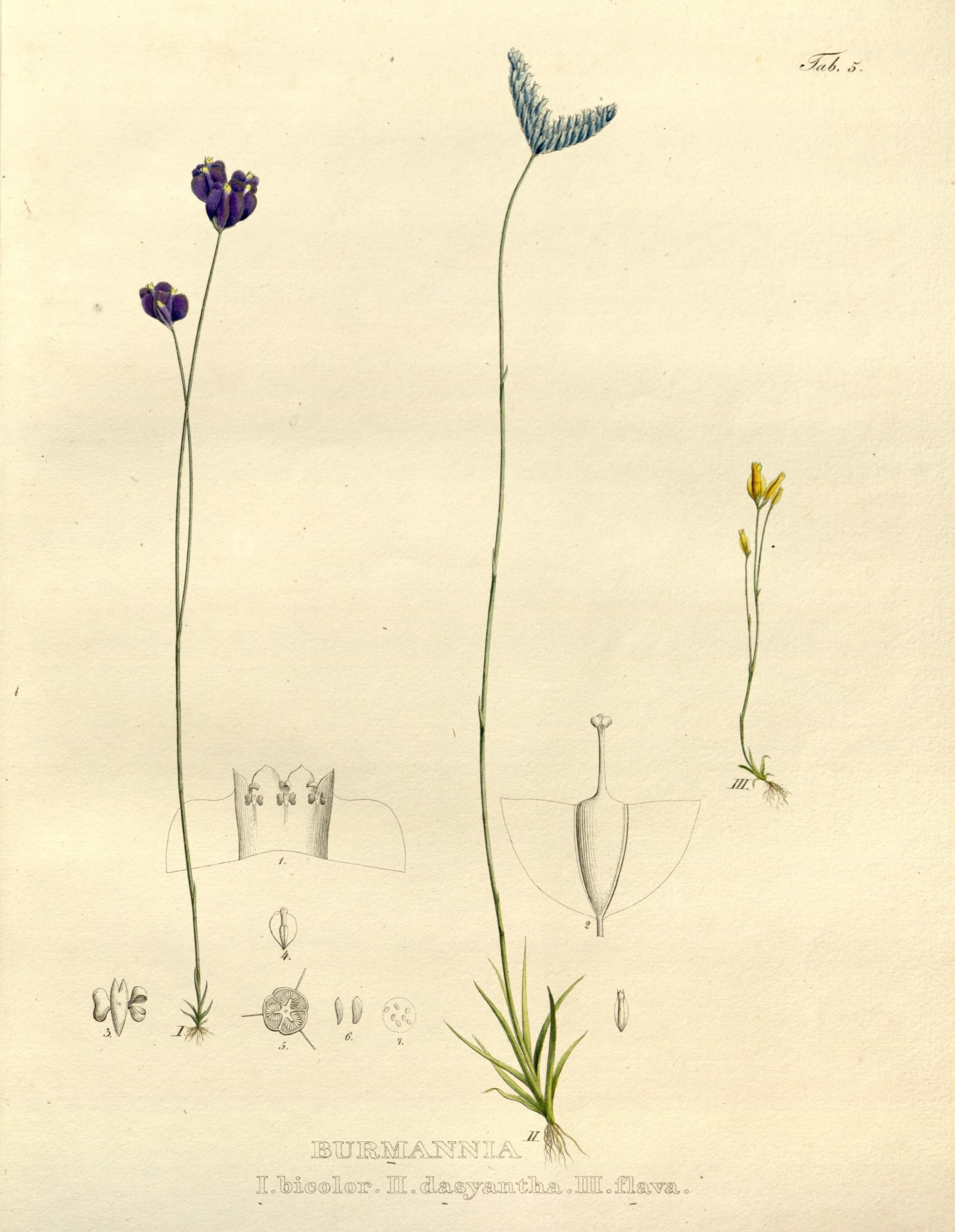 1. Burmannia bicolor, 2. Burmannia dasyantha, 3. Burmannia flava Nova genera et species plantarum. Monachii [Munich] :Impensis Auctoris,1824-1829 [i.e. 1824-32]..